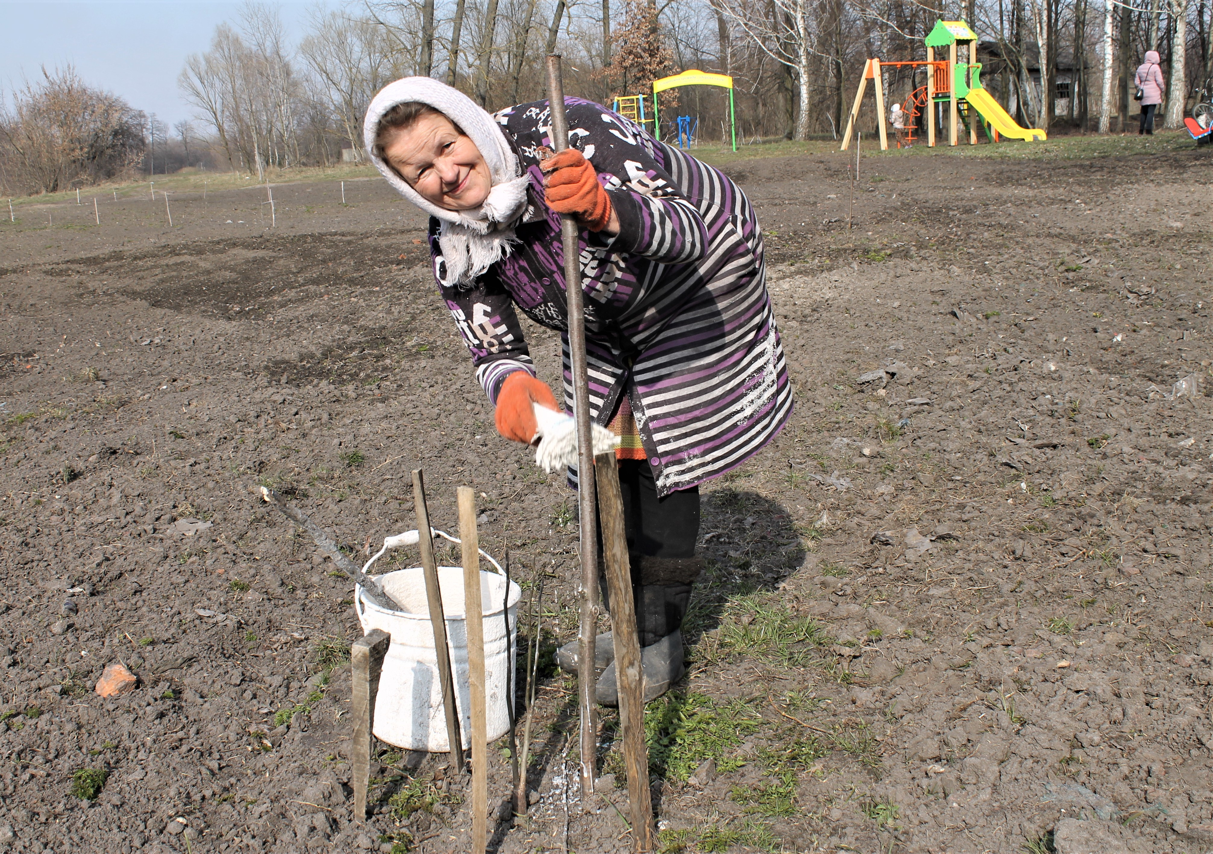 Любов Костюченко